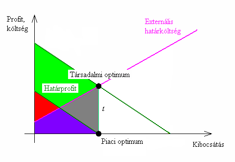 Externáliával járó termelésre kivetett Pigou-féle adó hatása